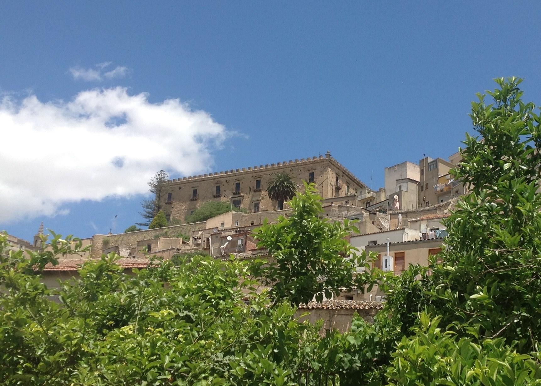 Palazzo Branciforti a Leonforte (solo esterni) This is a photo of a monument which is part of cultural heritage of Italy.